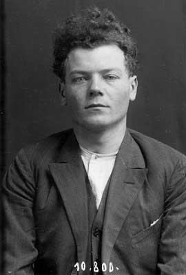 Martin Lecián (1900 - 1927), Český zločinec a vrah.